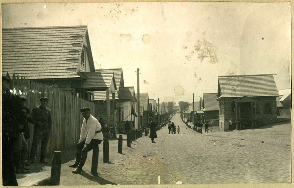 Беларуская (тарашкевіца): Койданаў (Kojdanaŭ), вуліца Слуцкая (vulica Słuckaja)